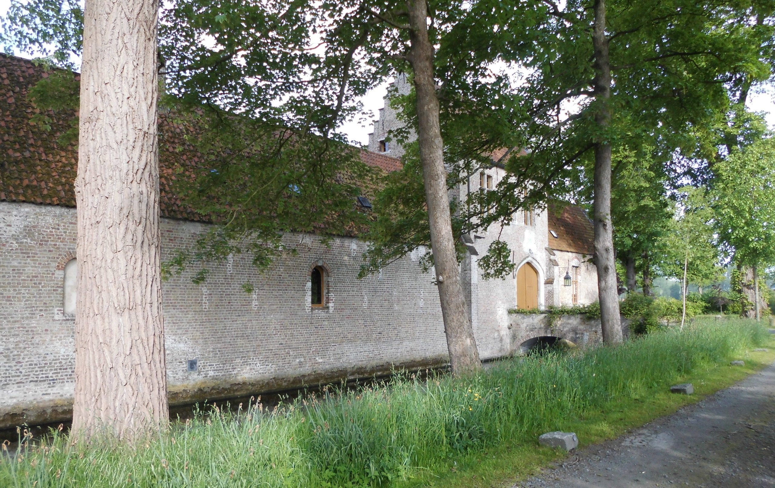 Poortgebouw van Kasteel Rooigem - Rooigem - Sint-Kruis - Brugge - West-Vlaanderen - België